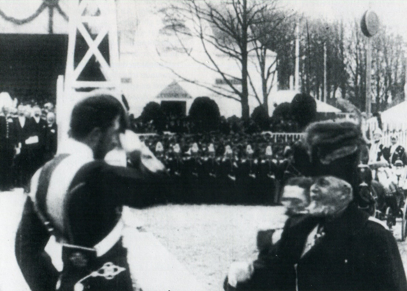 Kung Oscar II tillsammans med kronprins Gustaf (sedermera Gustaf V) anländer till utställningsområdet på Djurgården och där hälsas välkommen av Prins Eugen av Sverige. Stillbild från Alexandre Promio journalfilm H. M. Konungens ankomst till utställningen